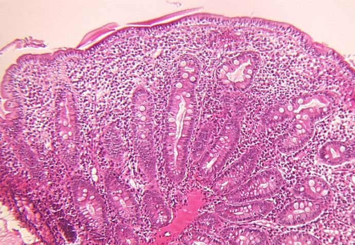 THE syndrome patient